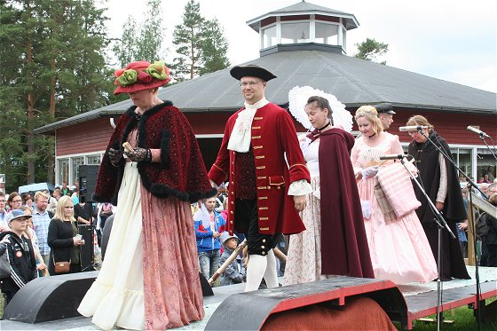 Historiallinen kulkue Narvan Markkinoilla vuonna 2015